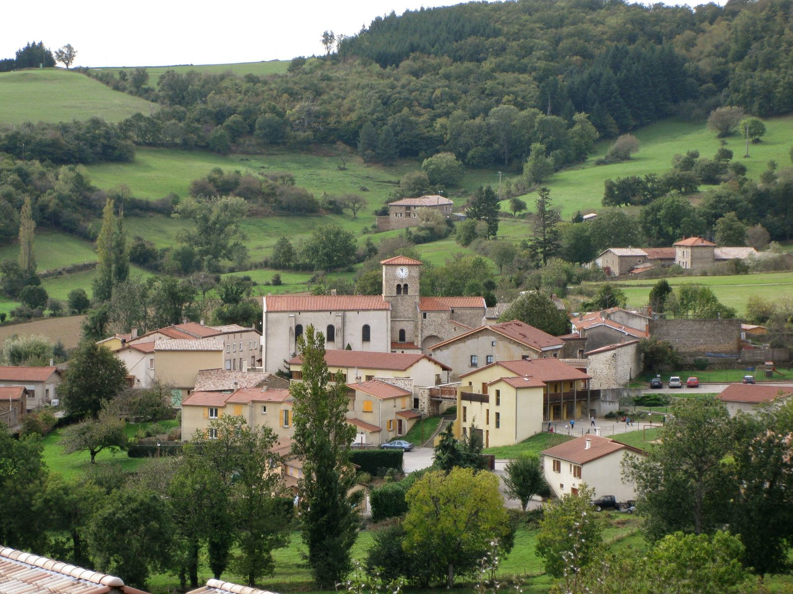 Village de Chuyer